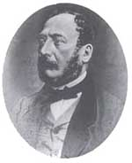 Giulio Porro Lambertenghi